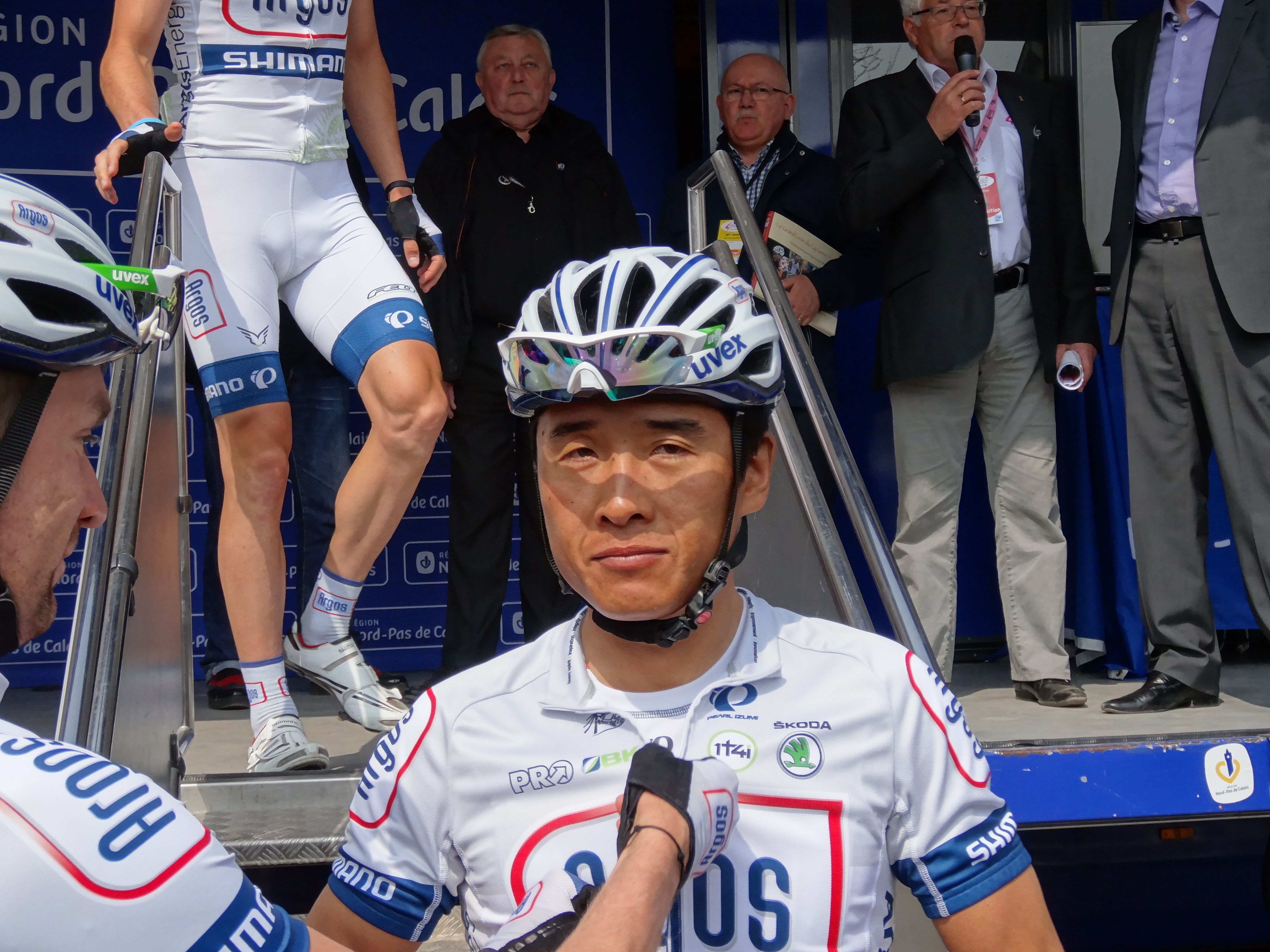 Reportage photographique réalisé le vendredi 3 mai 2013 au départ de la troisième étape de l'édition 2013 des Quatre jours de Dunkerque à la fosse no 9 - 9 bis de la Compagnie des mines de Dourges à Oignies, Pas-de-Calais, Nord-Pas-de-Calais, France, dans le bassin minier du Nord-Pas-de-Calais. Depicted person: Yan Dong Xing